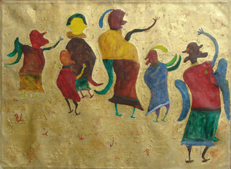 Bašićević Bosilj Ilija, Dolazak kosmonauta na mesec,1965.ulje-platno,50x67 cm